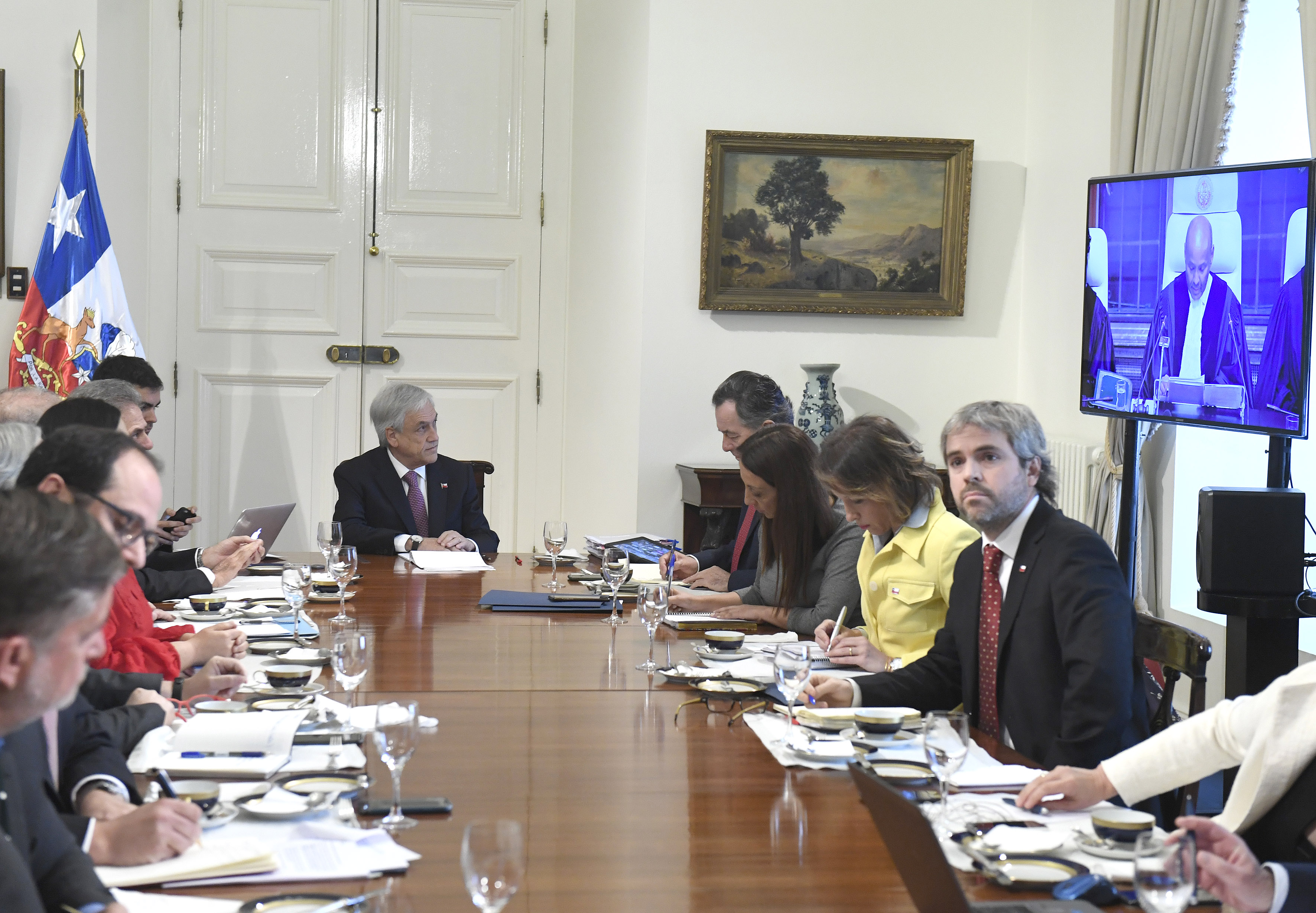 Sebastián Piñera en el día del fallo de la Corte Internacional de Justicia de La Haya sobre la demanda de Bolivia.